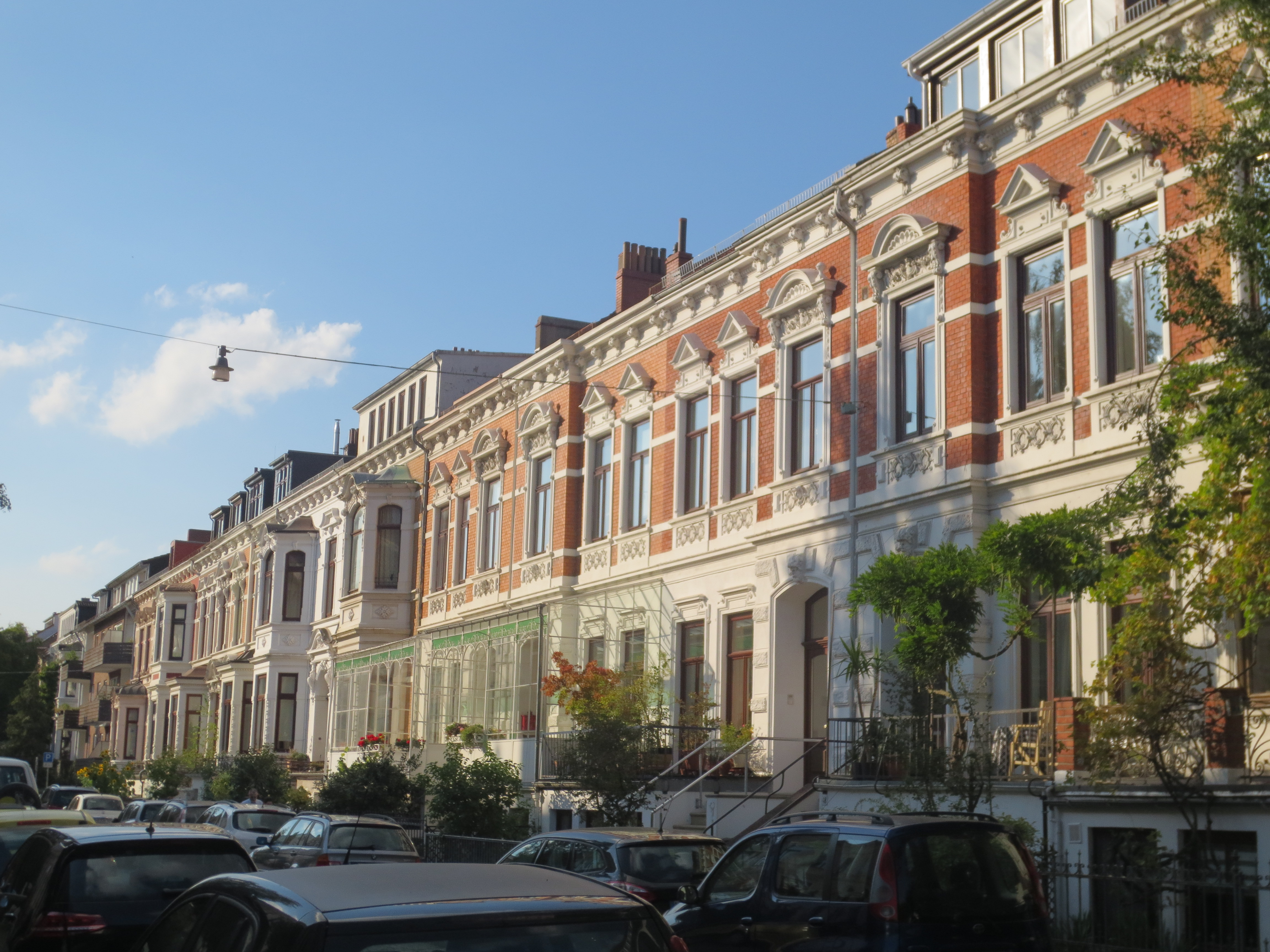 Wohnhausgruppe in Bremen, Feldstraße 23Die Denkmalgruppe ist ein geschütztes Kulturdenkmal in der Freien Hansestadt Bremen, mit der Nr. 1217 beim Landesamt für Denkmalpflege registriert.